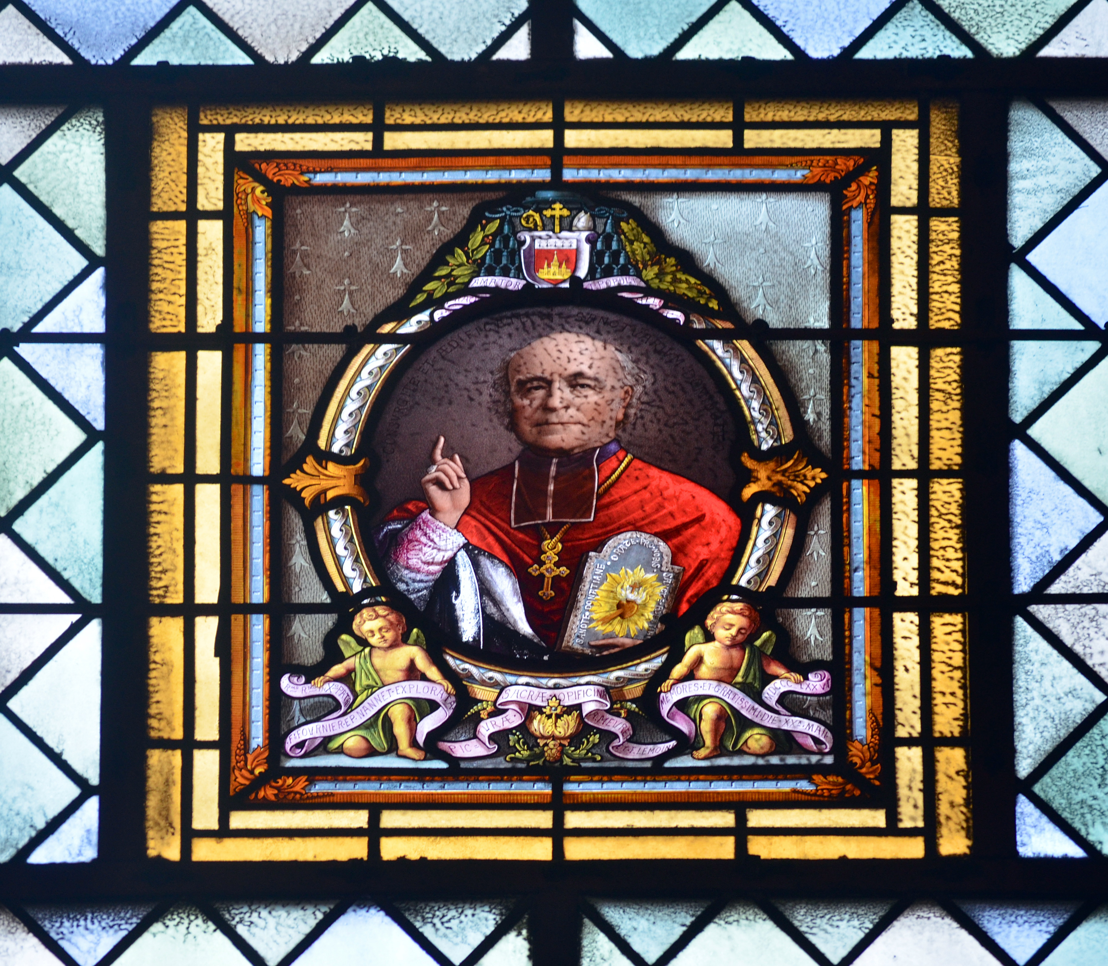 Vitrail en hommage à Mgr Félix Fournier (1803-1877), évêque de Nantes en 1870. Basilique Saint-Nicolas - Nantes (Loire-Atlantique)